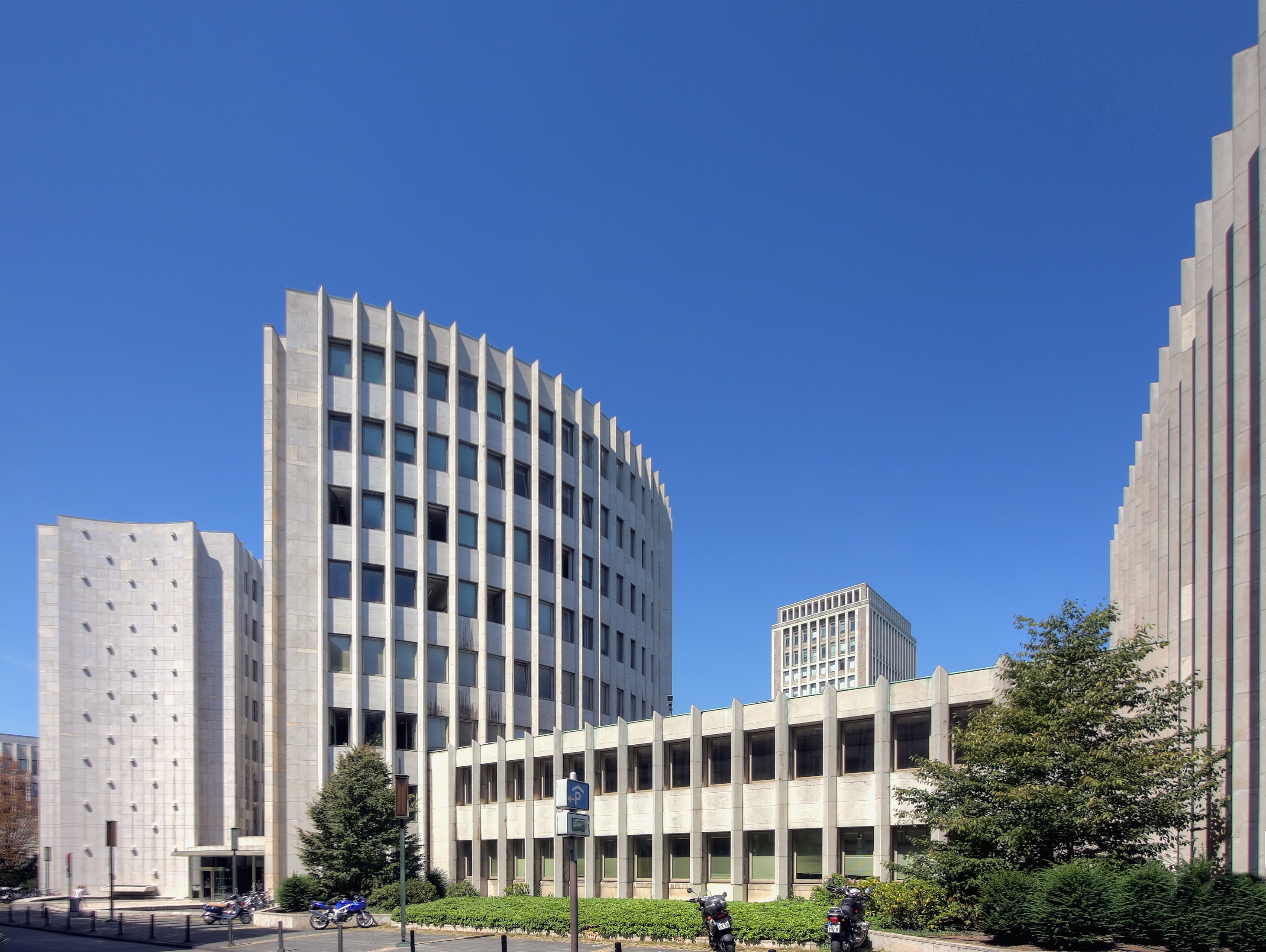 Gerling-Viertel Köln - Gebäude in der Straße Gebäudekomplex Im Klapperhof. Architekten: Franz-Heinrich Sobotka und Gustav Müller. Baujahr: 1961-66